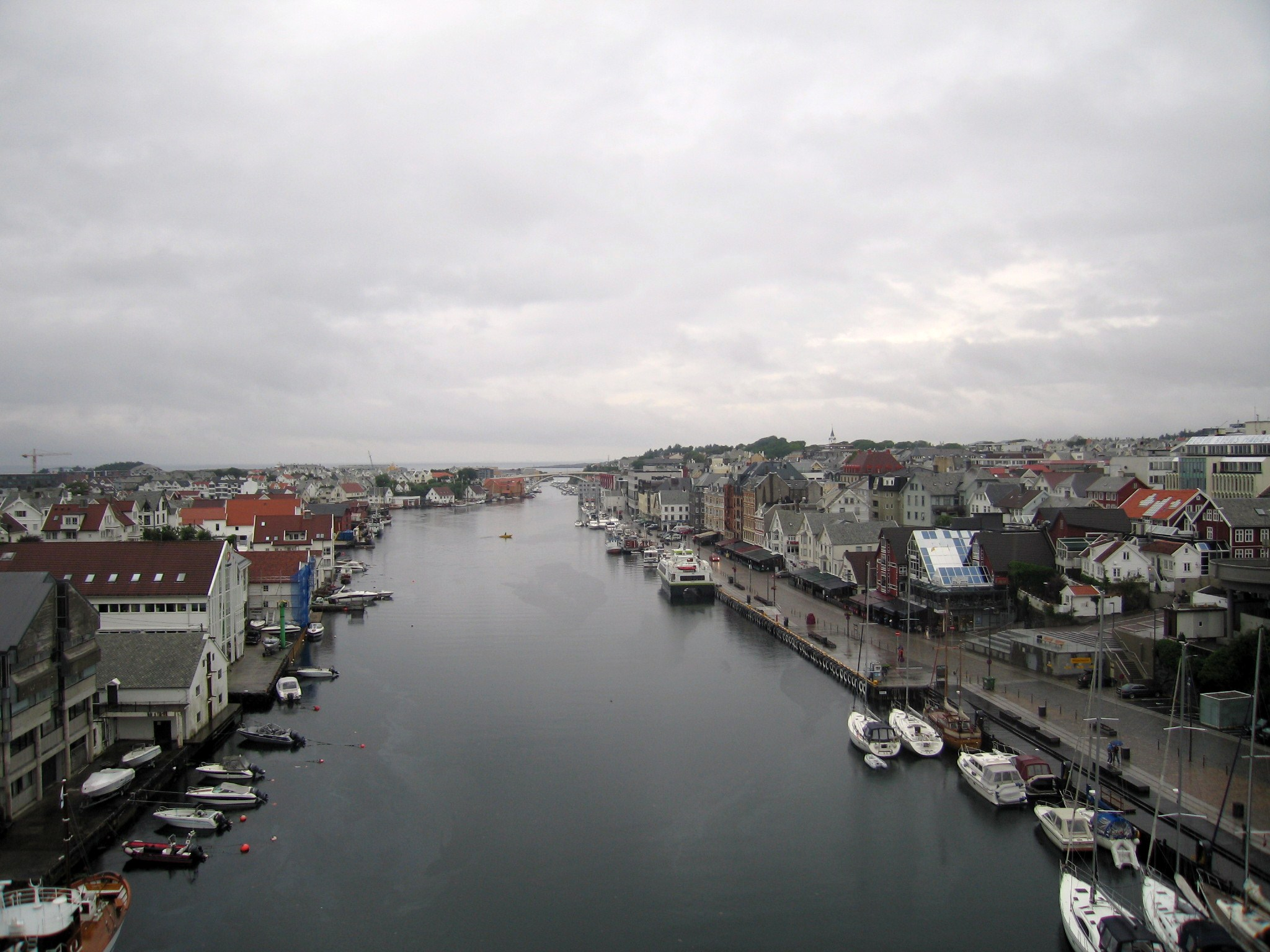 Smedasundet i Haugesund. Utsikt nordover frå Risøybrua.